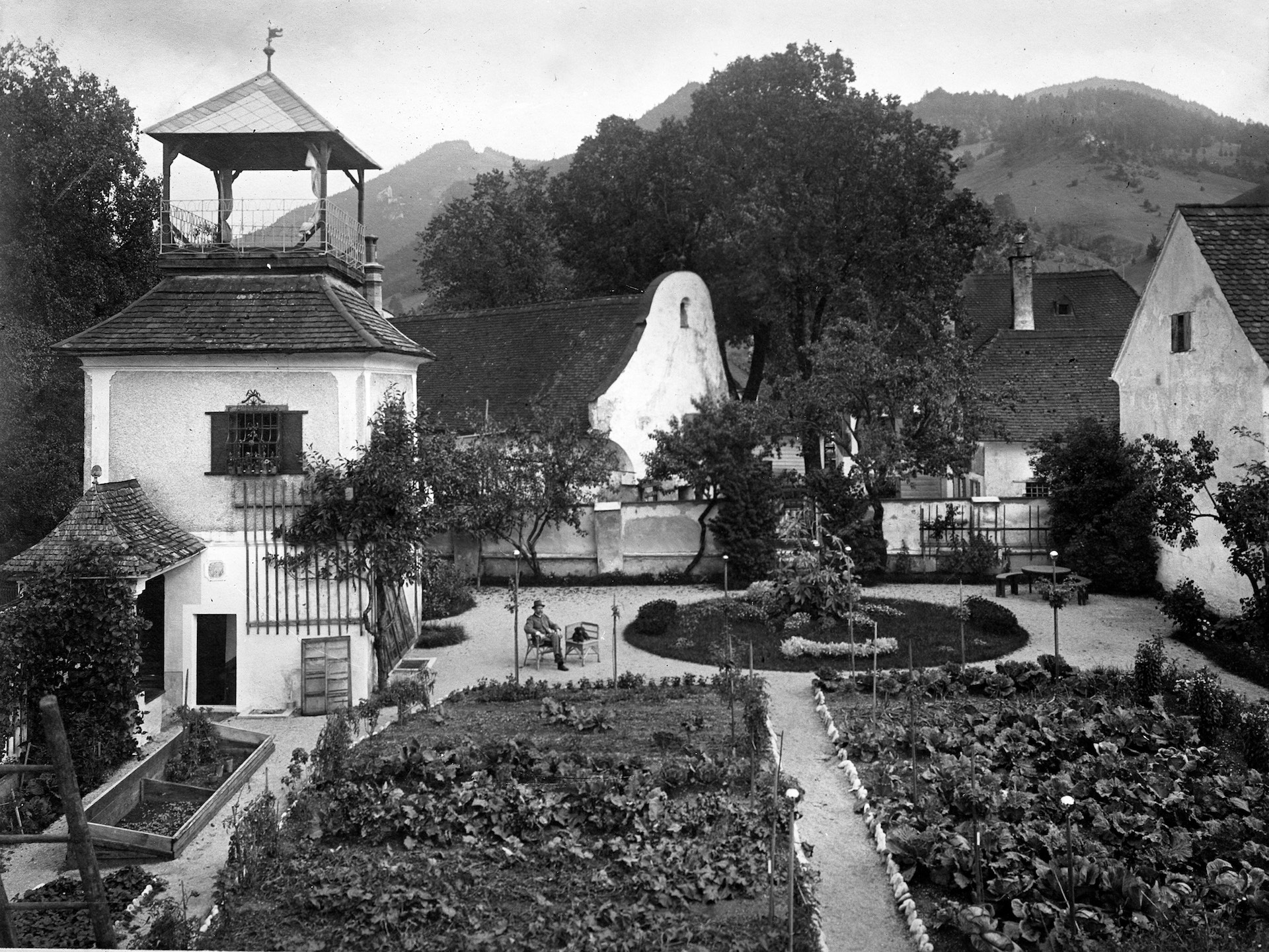 Ehemalige Sensenschmiede an der Zinne. Garten mit Gartenhaus, im Hintergrund Hammergebäude und altes Herrenhaus, rechts im Bild das Schmiedhaus.